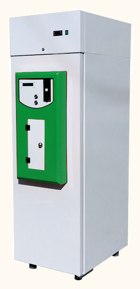 Fotografie automatu na víno.